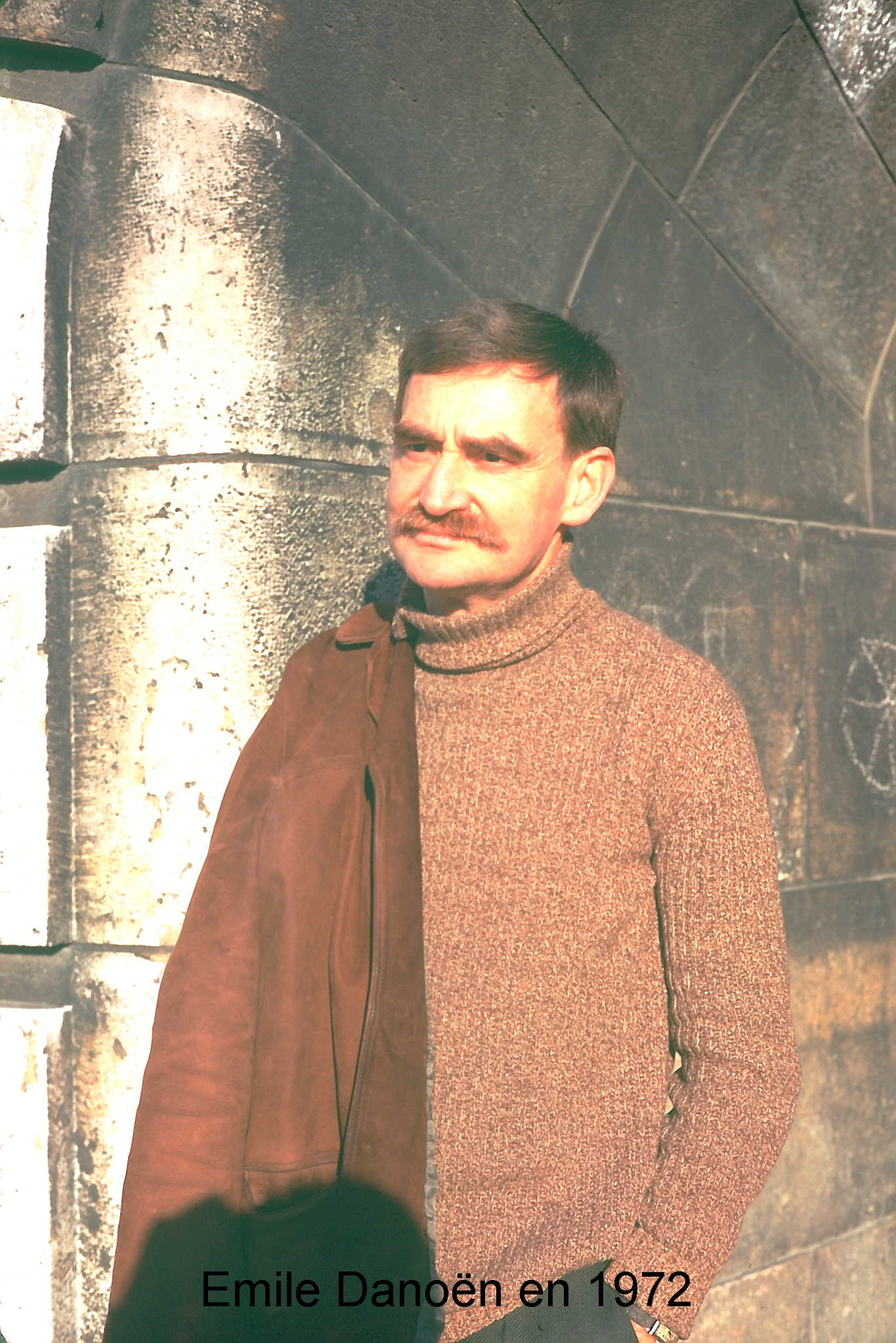 Emile Danoën en 1972 à Paris